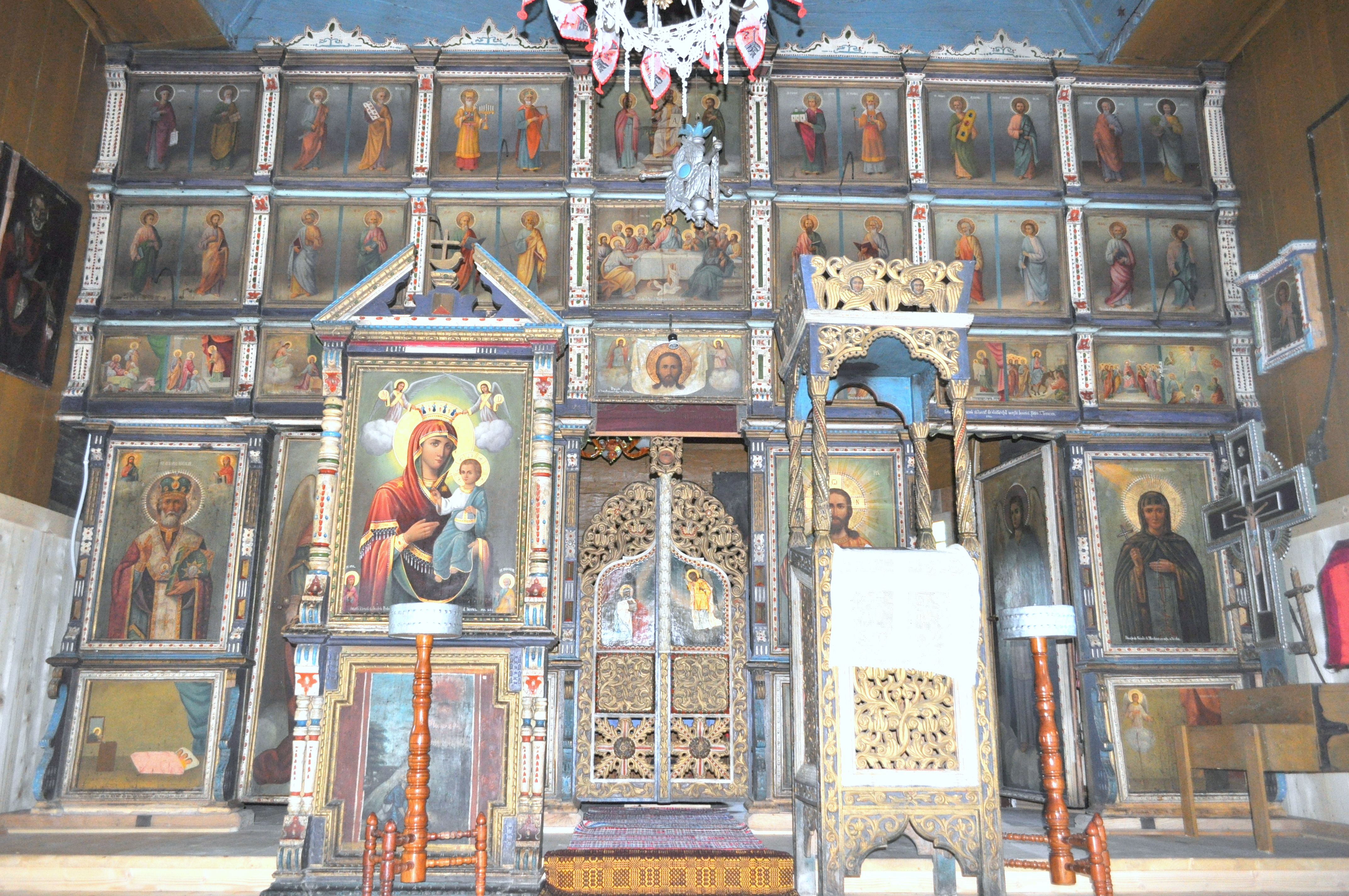 Biserica de lemn „Cuvioasa Paraschiva” din satul Valea Sării, județul Vrancea